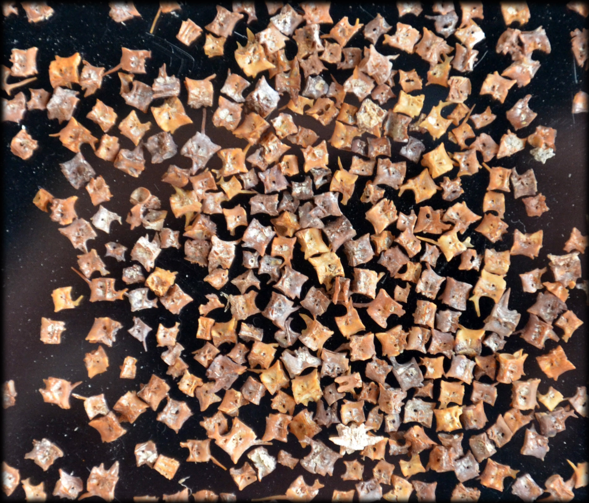 Vertèbres d'anguilles trouvées lors de fouilles archéologiques (poisson prisé et très consommé dans l'empire romain et au moyen-âge où il était abondant). Photo prise lors d'une exposition publique intitulée "De la fouille au laboratoire", organisée par le "Learning Center archéologie/égyptologie de l'université de Lille 3", dans le hall du Conseil régional nord-Pas-de-Calais (2012)